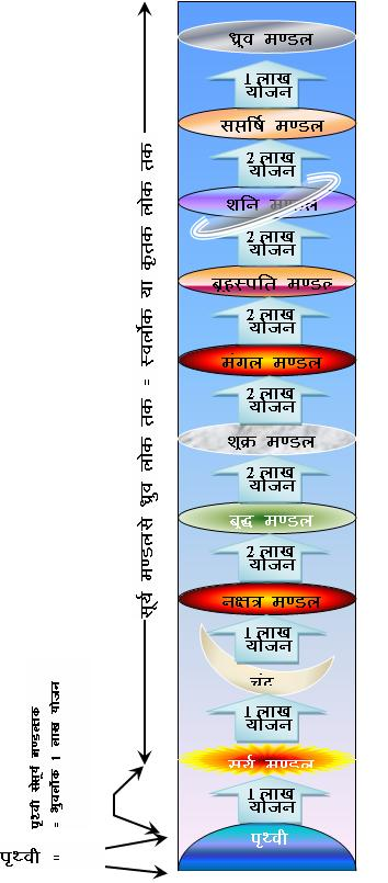 पृथ्वी के ऊपर के सभी लोक